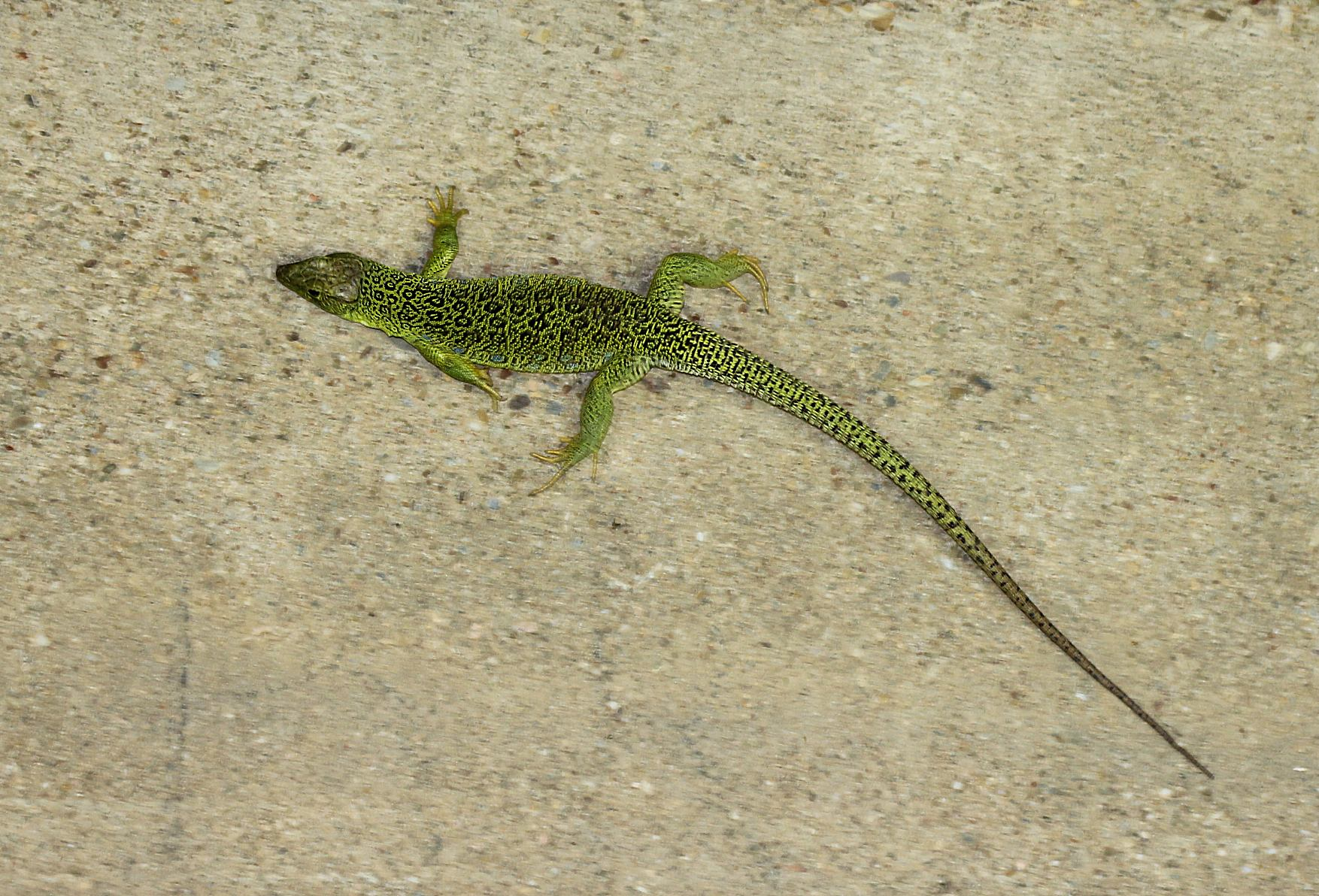 Lézard ocellé sur casot